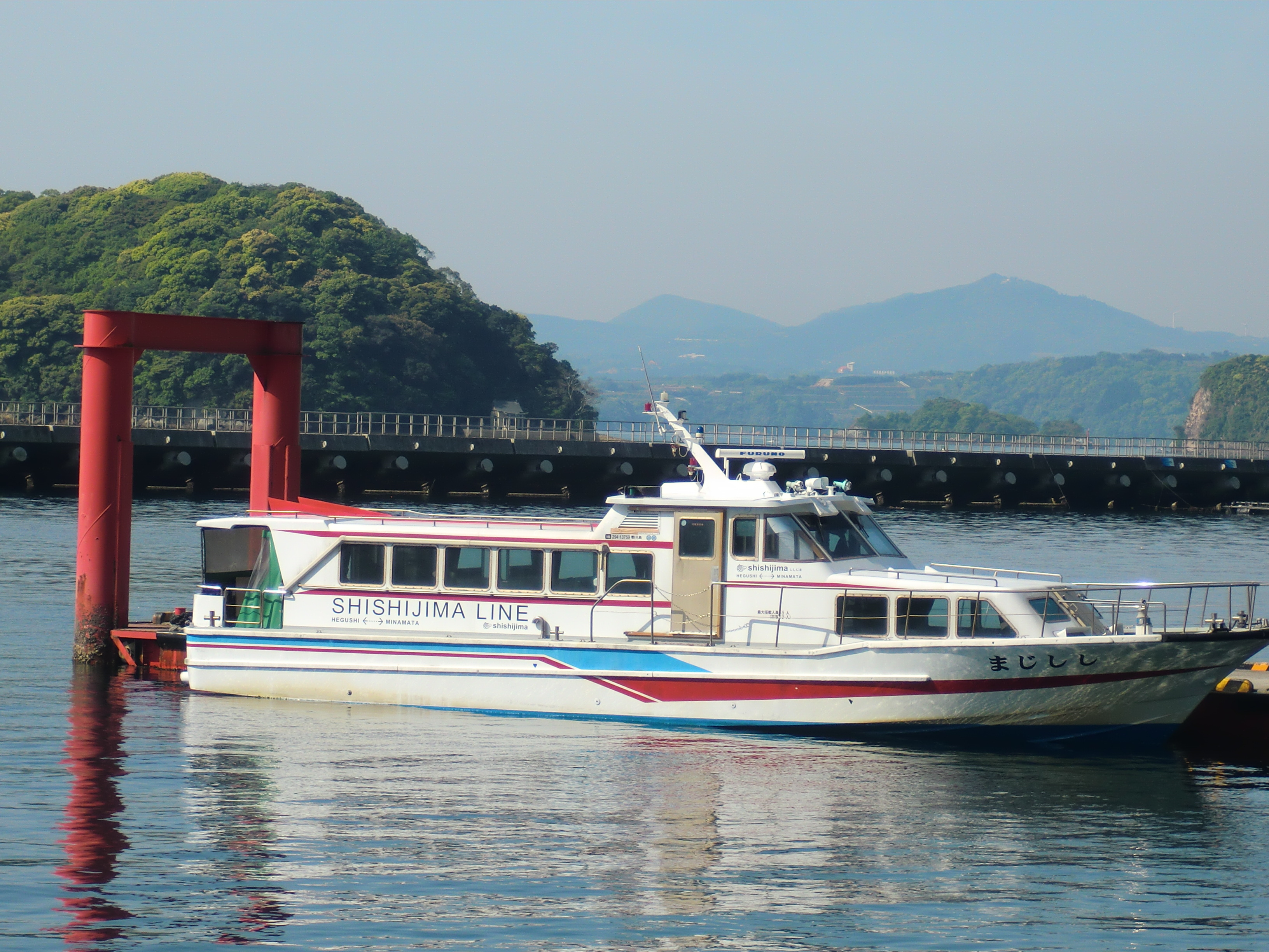 鹿児島県出水郡長島町幣串（へぐし）漁港に停泊中の高速船ししじま